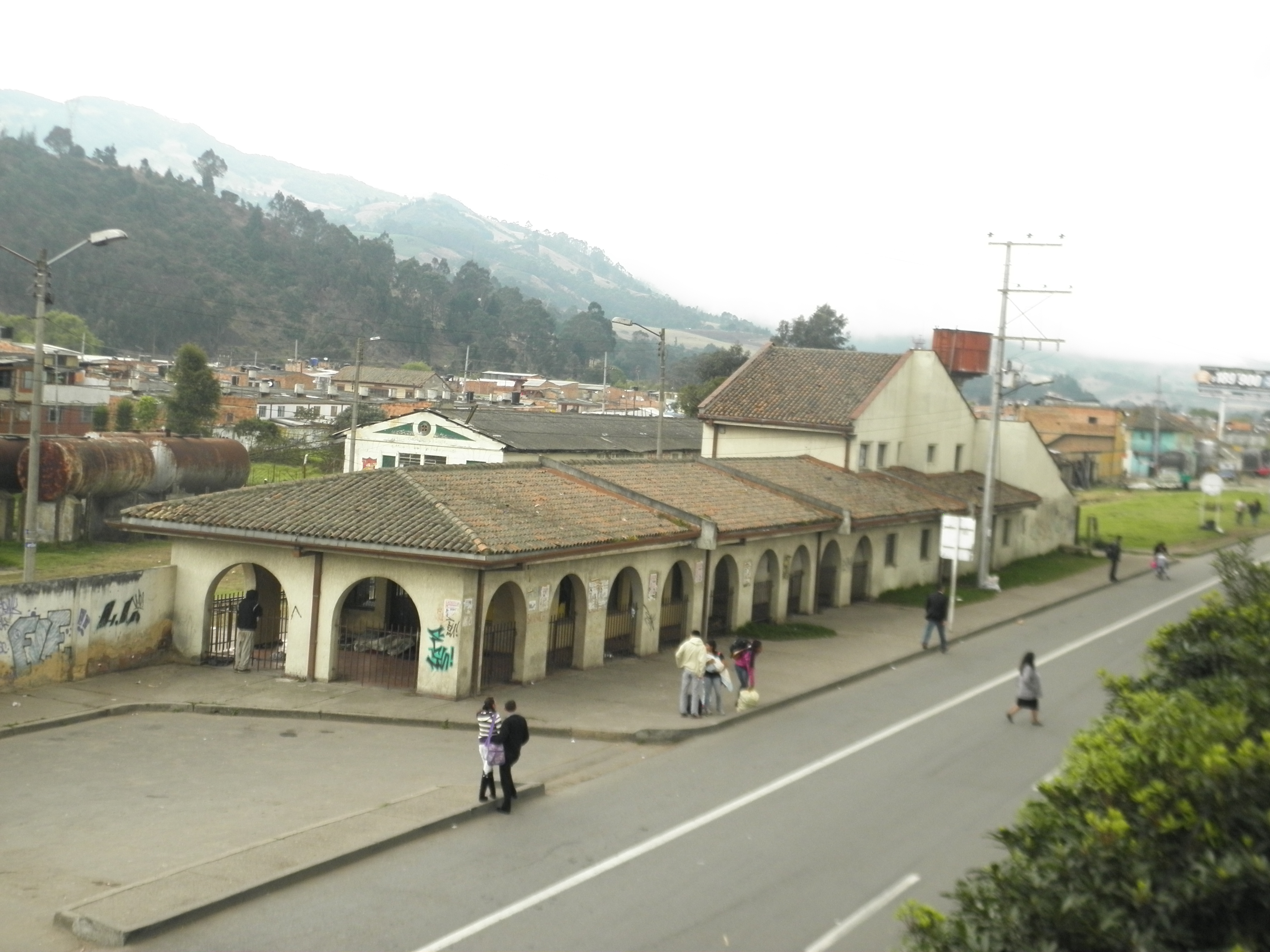 Estación Férrea de Facatativá